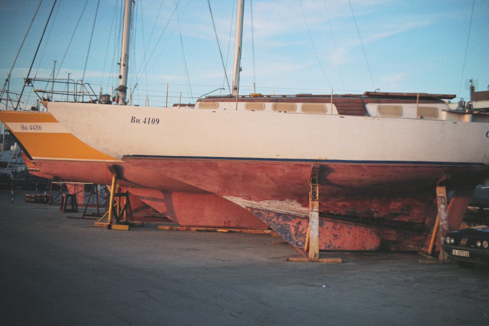 Lang- und Kurzkieler